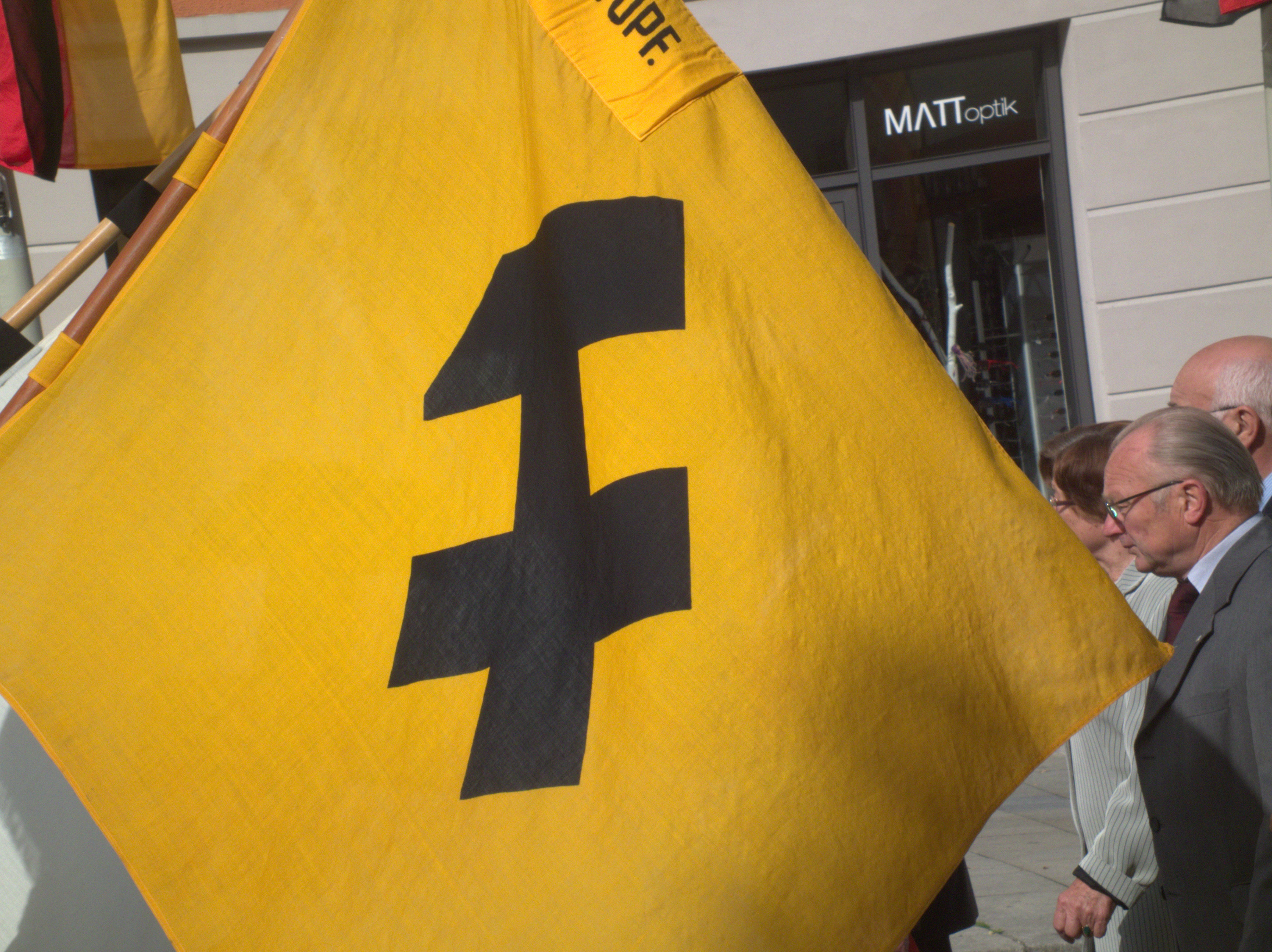 Die gemeinsame Fronleichnamsprozession der beiden Stadtpfarreien St. Johannes und der Hofkirche in Neumarkt am 07. Juni 2012 i